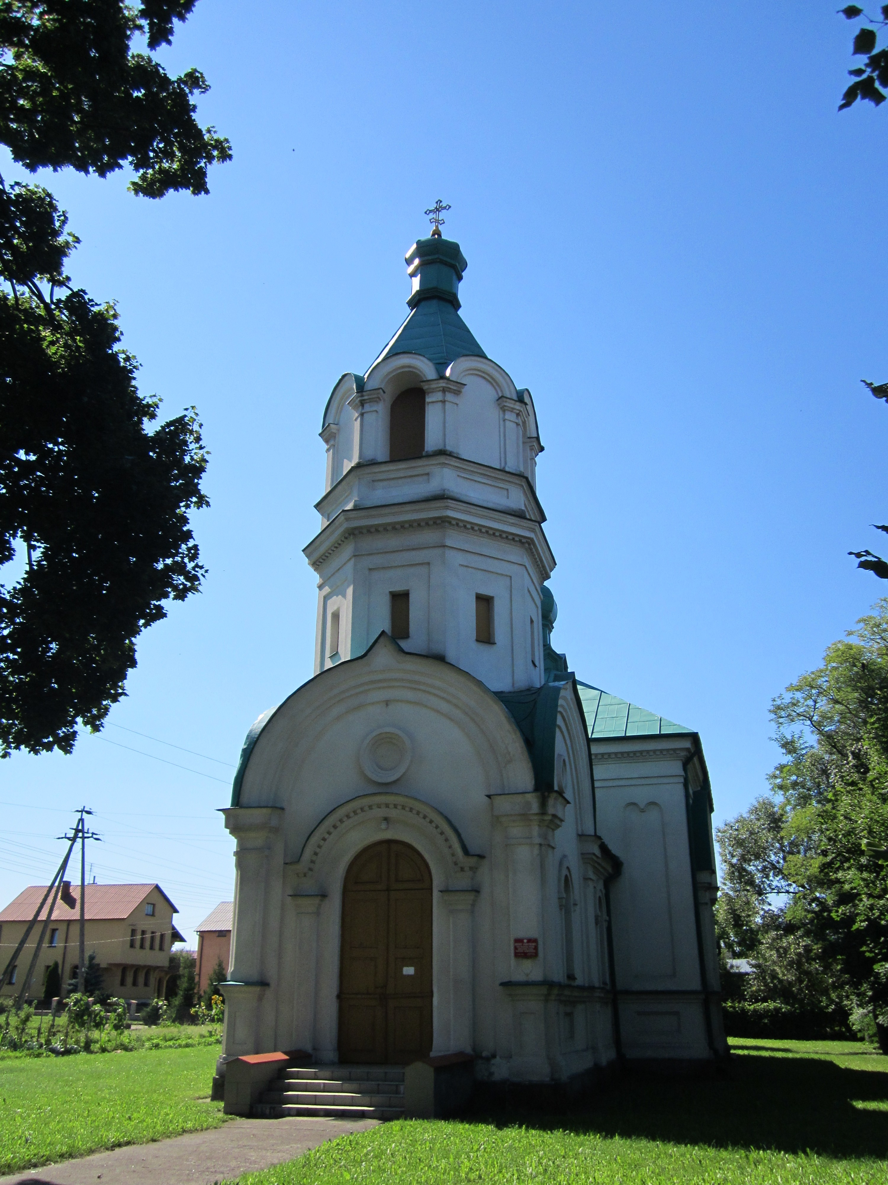 Cerkiew ta znajduje się w Ciechanowcu przy ul. Mickiewicza, została wybudowana 1864 r., według o. G. Sosny ,, w 1877 r. wybudowano murowano cerkiew, która przetrwała do naszych czasów”. Według M. Kałamajskiej-Saeed wzniesiono w 1875 r. inne źródła podają datę, np. 1884. Wiadomo natomiast, iż cerkiew ta stoi na cmentarnym placu unickim, na który przeniesiono w 1730 r. unicką cerkiew z Malca. Obecnie przy cerkwi od ul. Pińczowskiej znajduje się ogród warzywny.